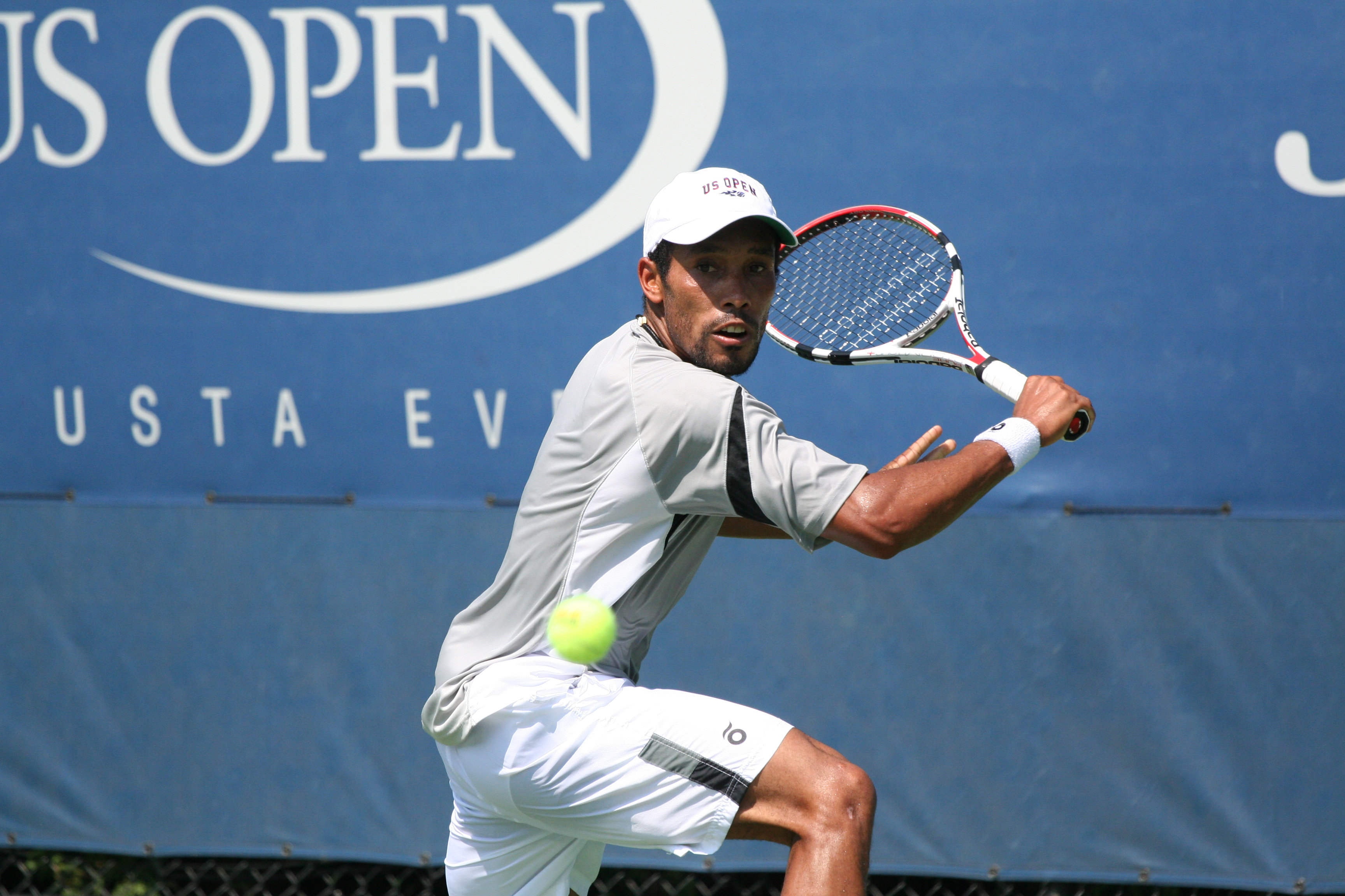 U.S. Open Aug. 31, 2010